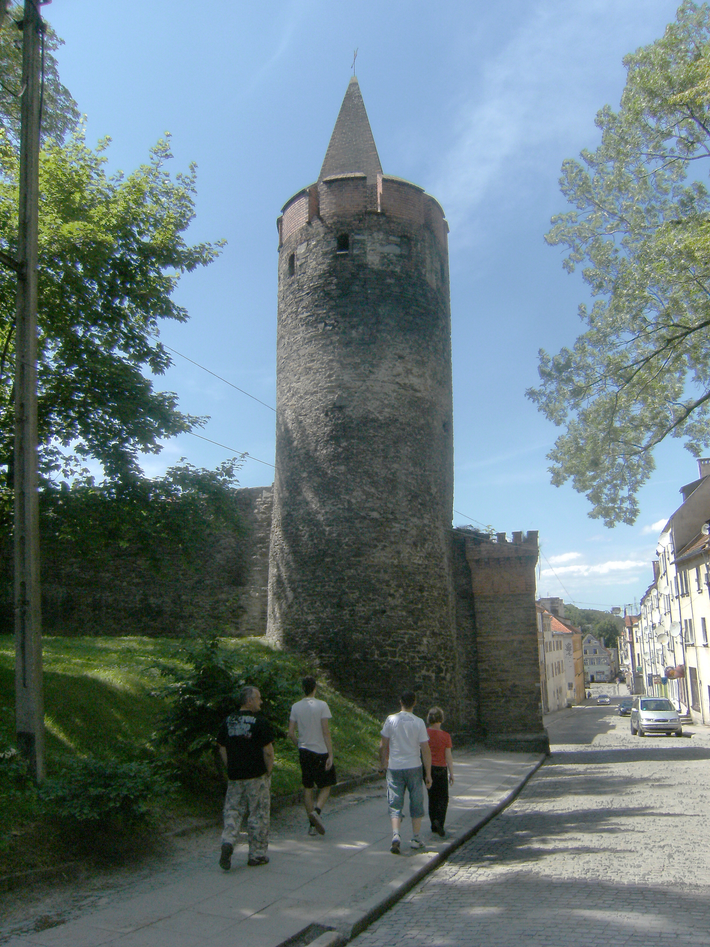 Zespół obwarowań miejskich. Baszta bramy nyskiej. Paczków - ul. Wojska Polskiego, Paczków